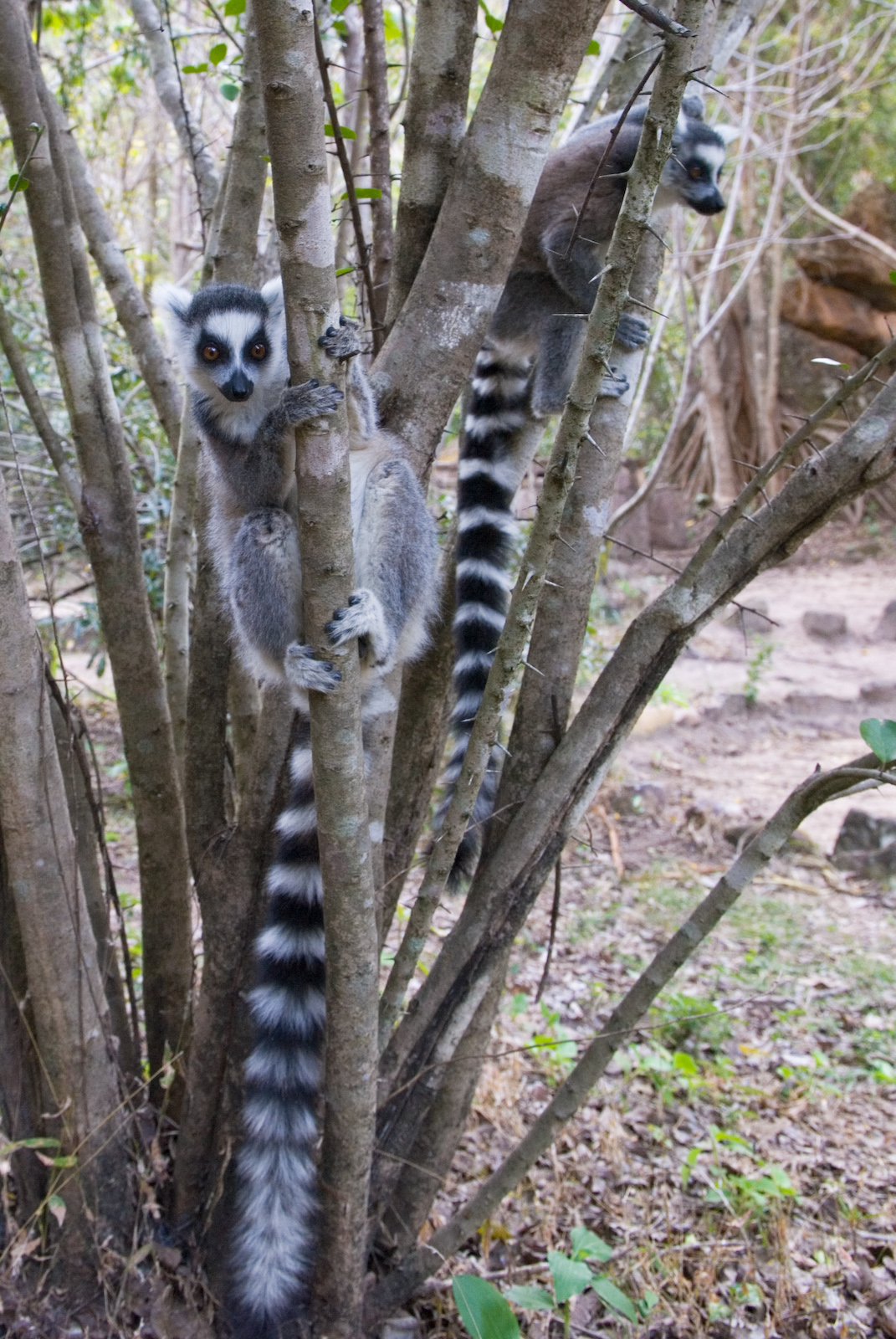 Lémur Catta